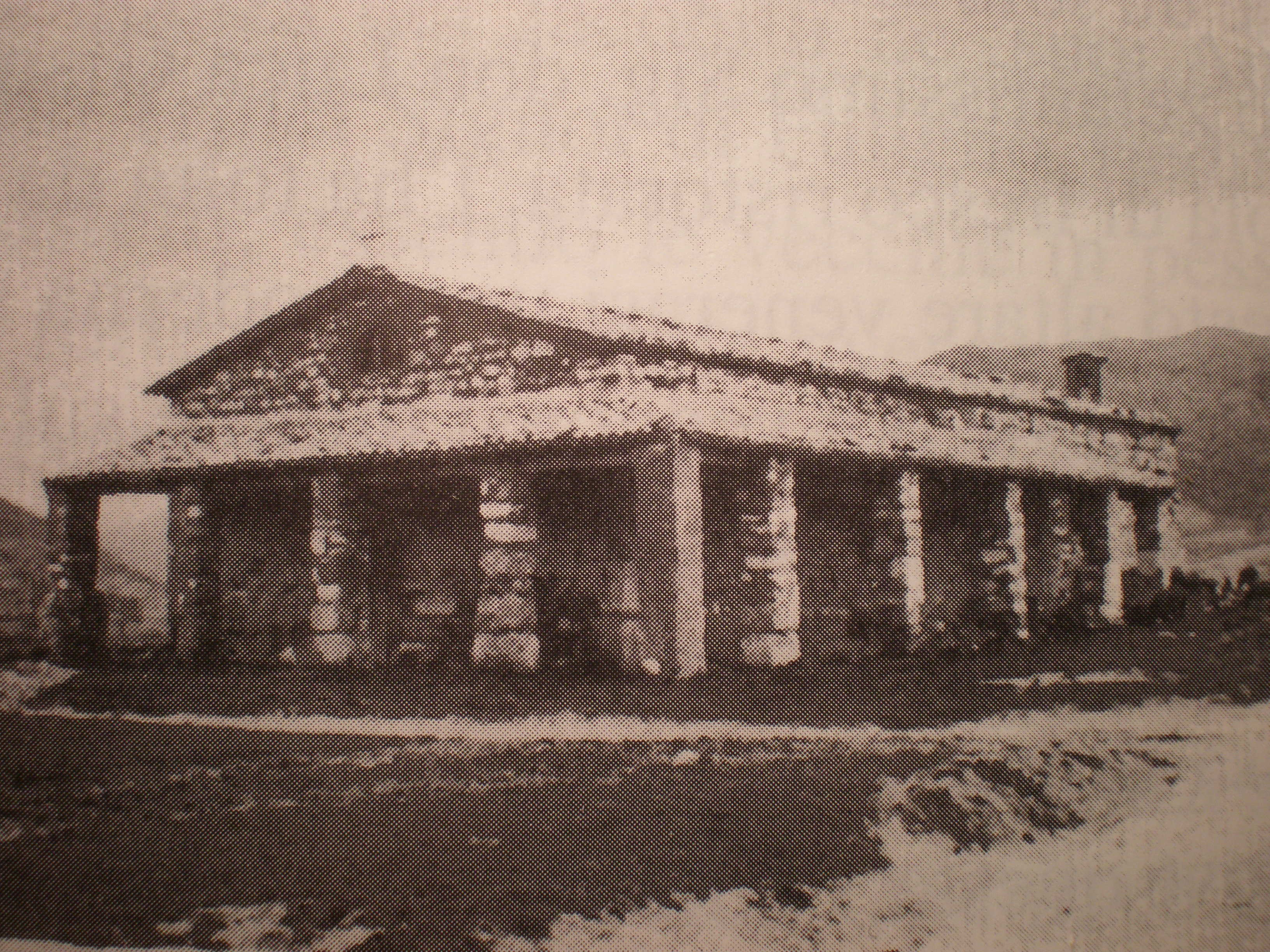 Santa Maria di Pistia prima dei restauri del 1967-71